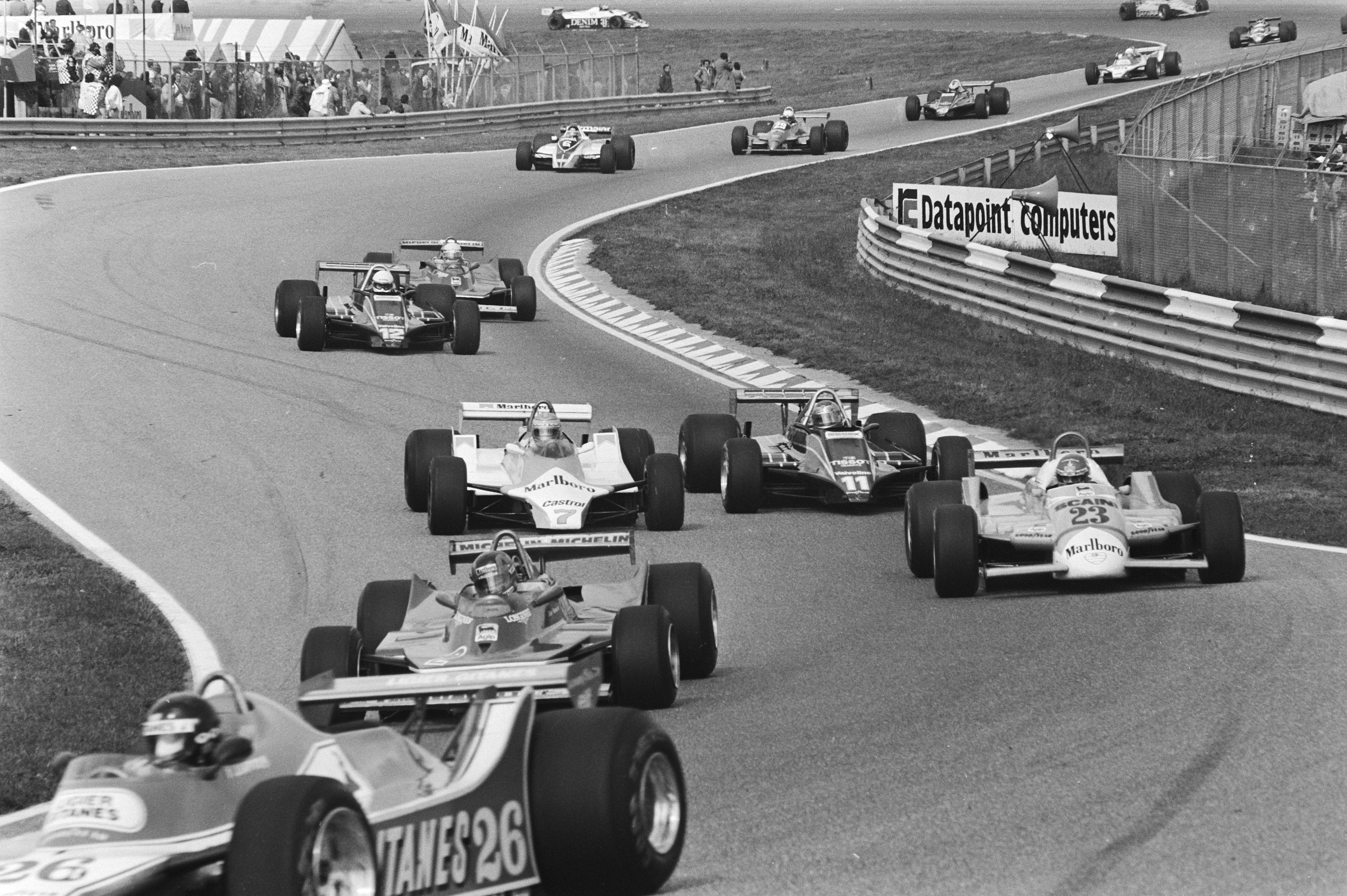 Overzicht na start.